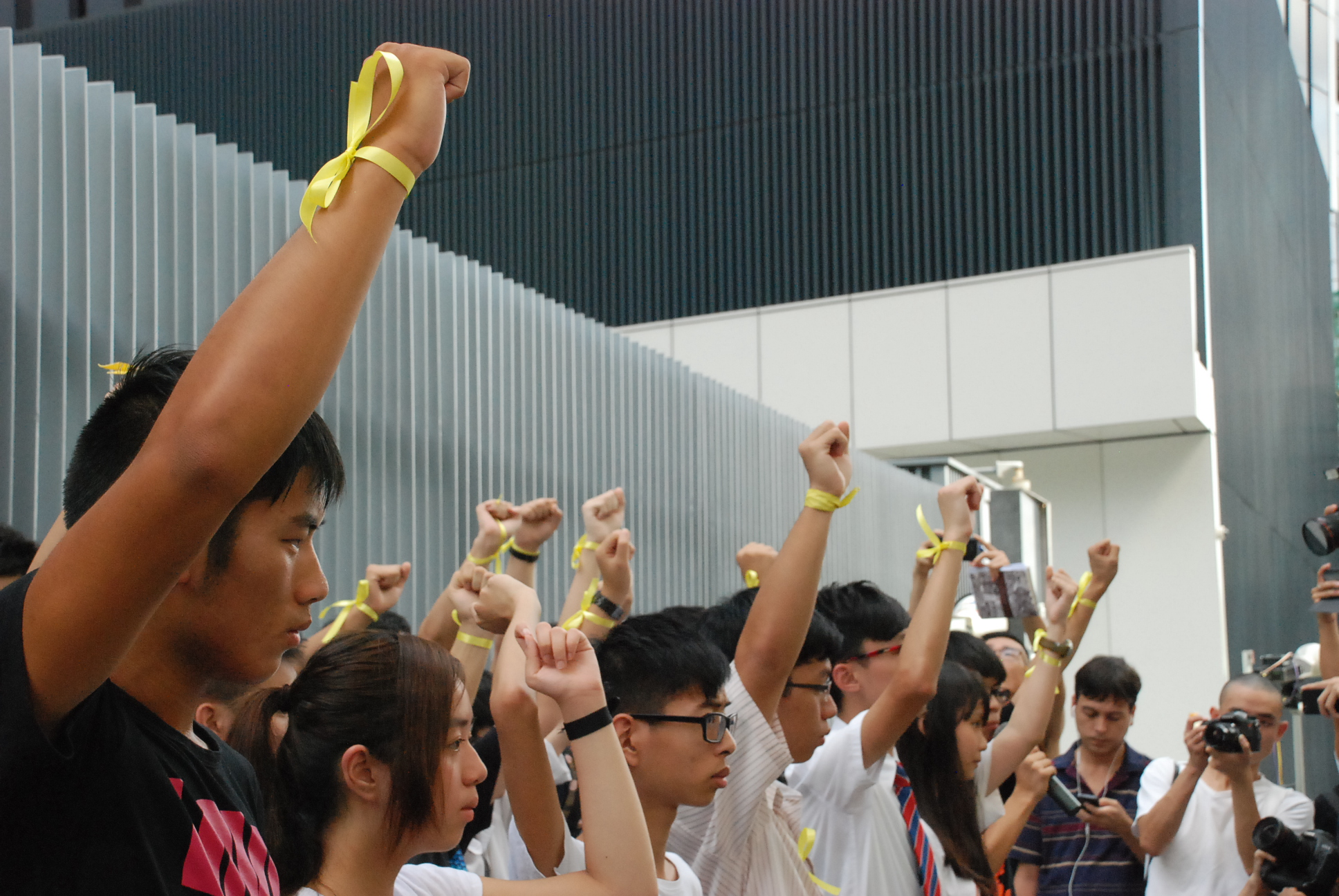 數十名中學生高舉綁上代表真普選的黃絲帶的手，展示參與中學生罷課爭取真普選的決心